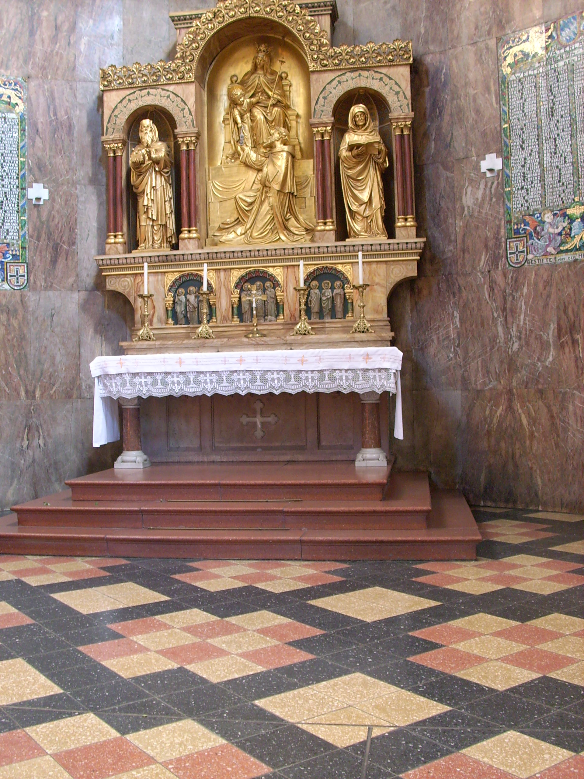 Blick zum Seitenaltar im östlichen Querhaus, St. Josef (Weiden in der Oberpfalz)